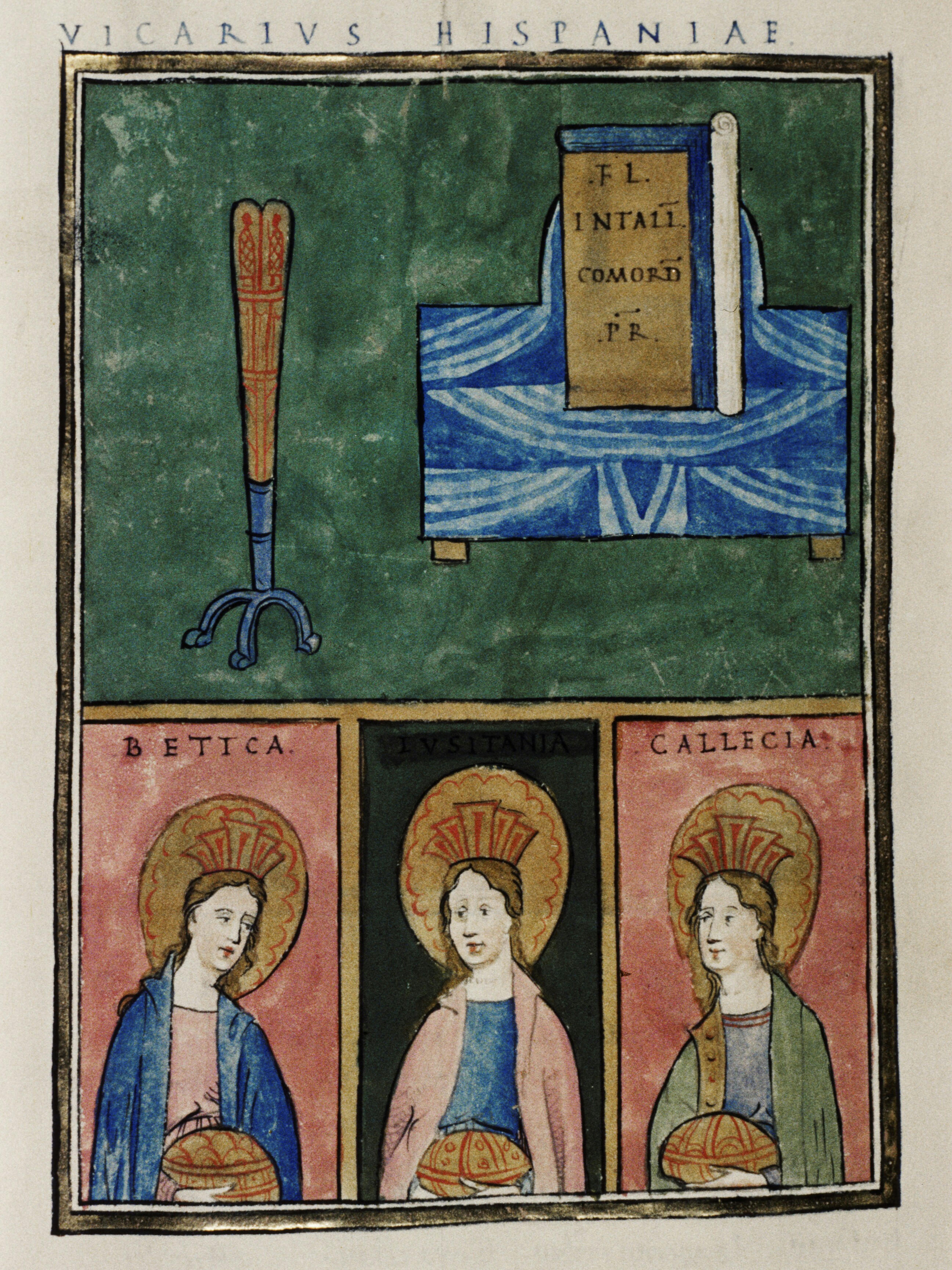 «Vicarivs Hispaniae» na copia do Notitia Dignitatum de 1436 (fol. 148v).